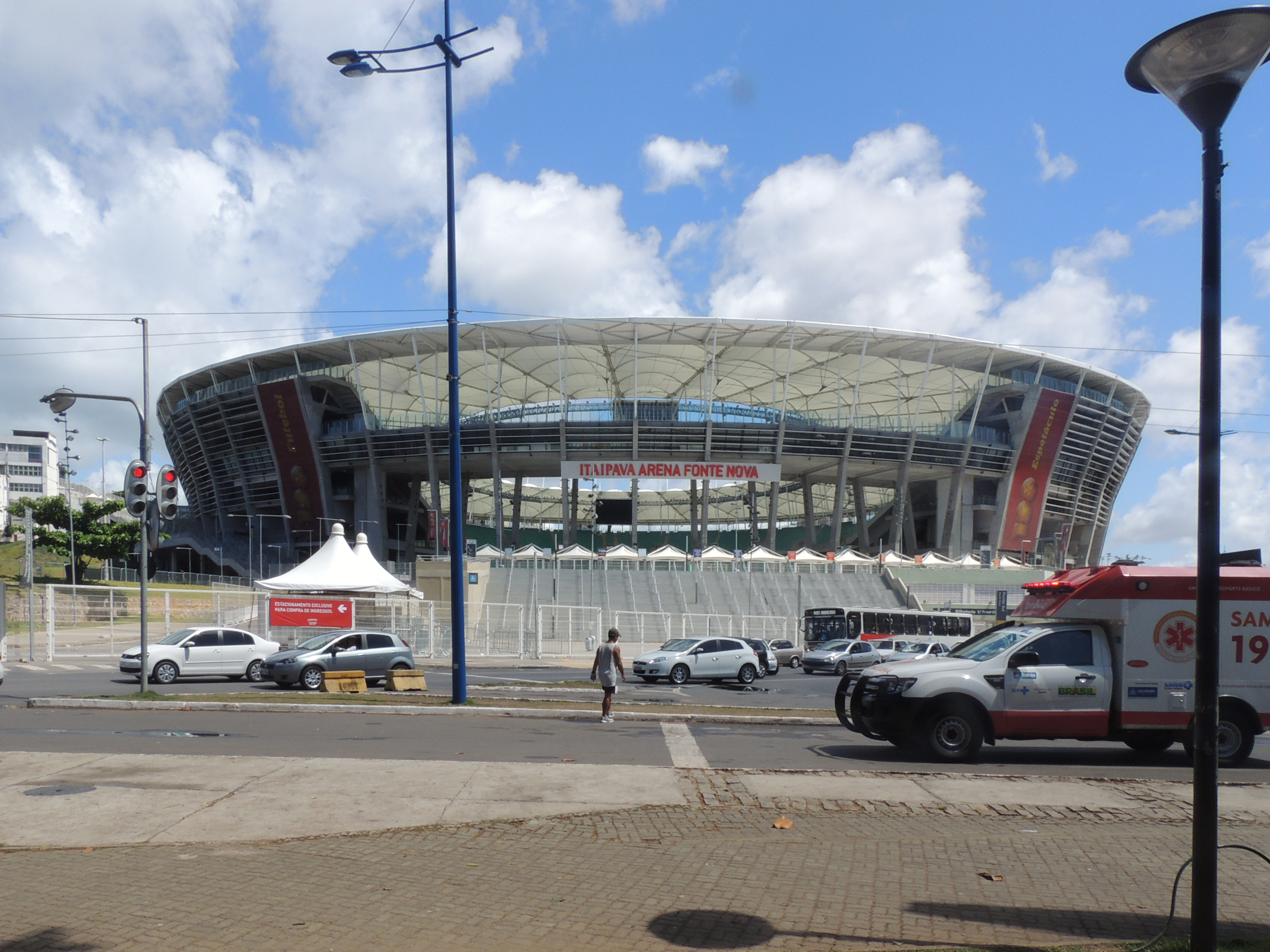 Frente del EstadioArena Fonte Nova